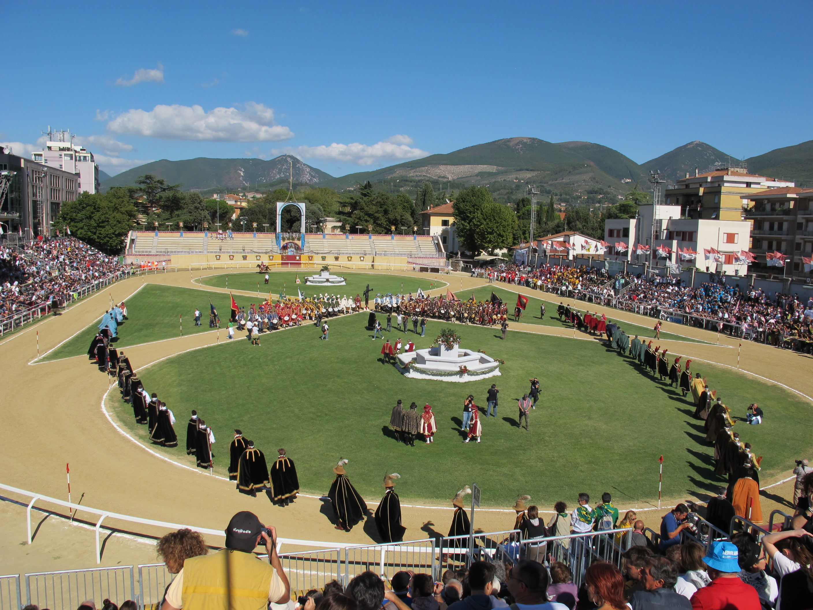 Quintana di foligno, giostra